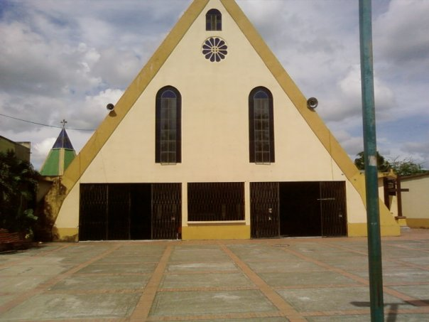 Façade de l'église de Granada, (département de meta, Colombie) photographiée par ma fille en septembre 2008